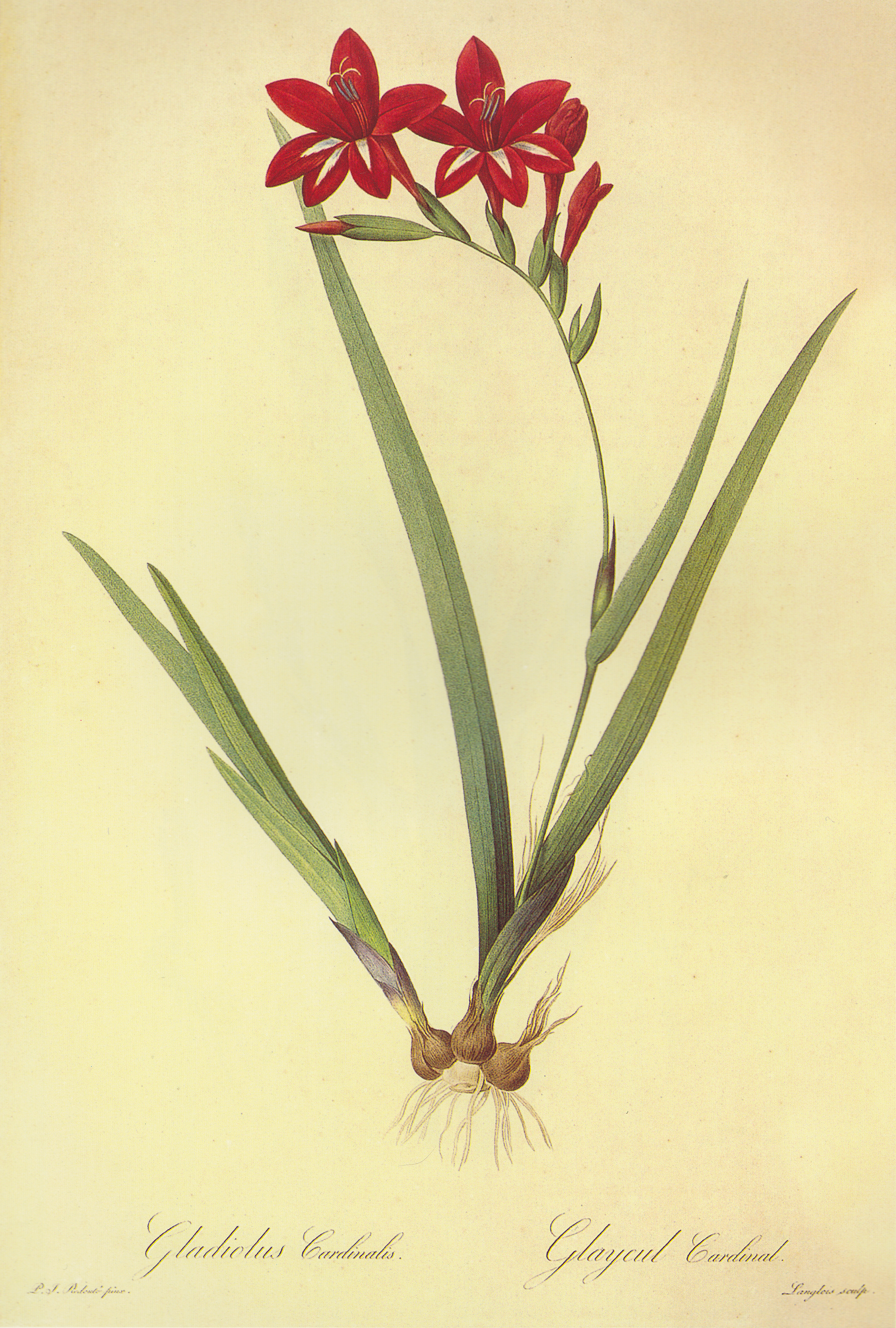 新年百合。原产于非洲。